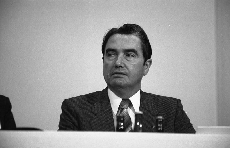 26. Bundesparteitag der CDU in der Friedrich-Ebert-Halle in Ludwigshafen 23.-25.10.1978